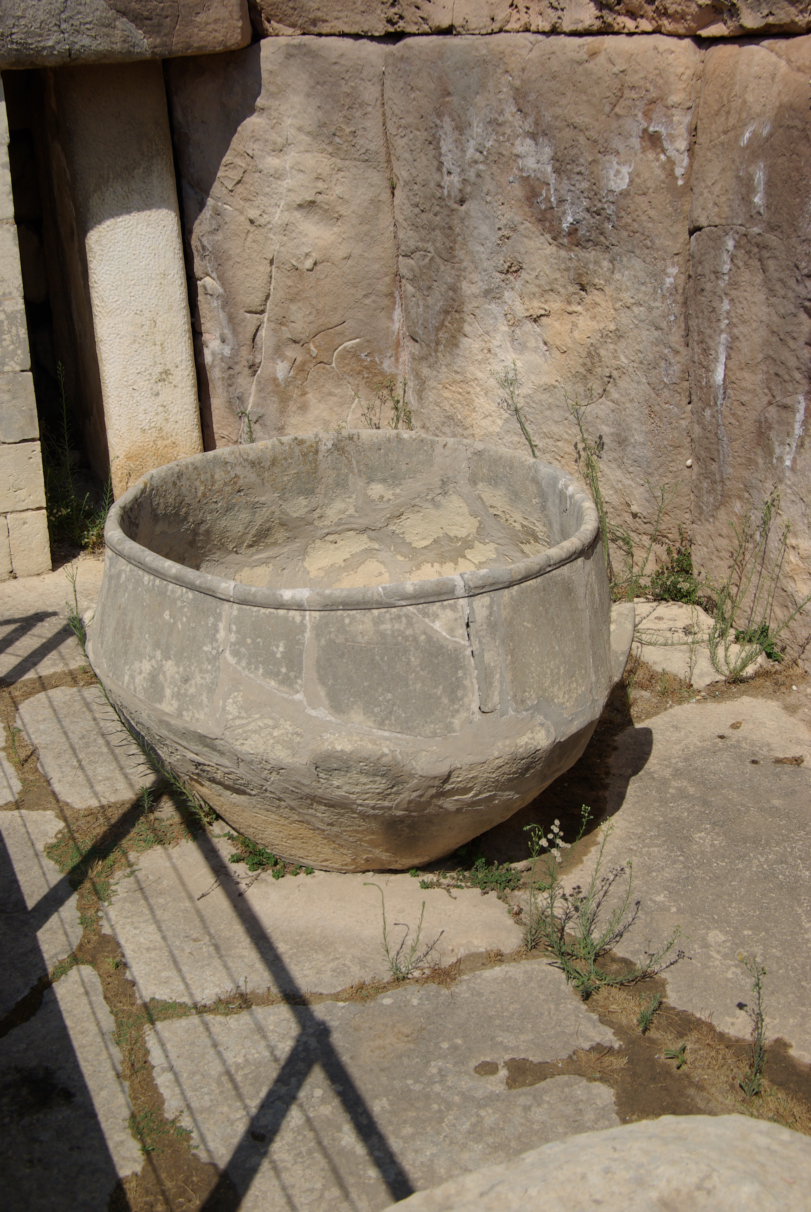 Malta, Tempel von Tarxien, Opfergefäß.